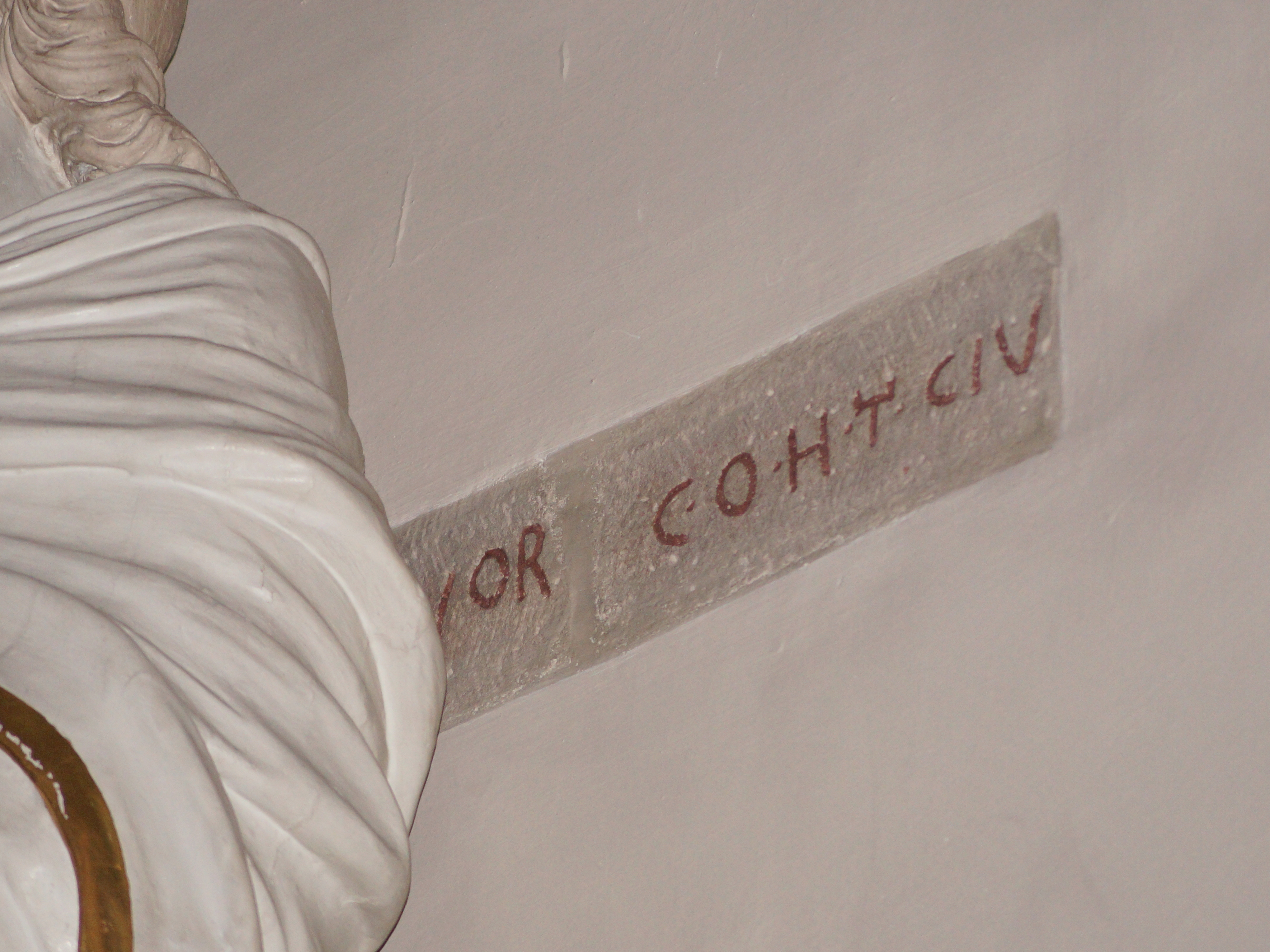 Römische Inschrift der coh. I civium Romanorum eq. in der Einhards-Basilika vermauert. Leider nur halbseitig zu sehen, da der Apostel Bartholomäus den rechten Teil "ROMANOR..." verdeckt. Die Steine sind in falscher Reihenfolge vermauert.